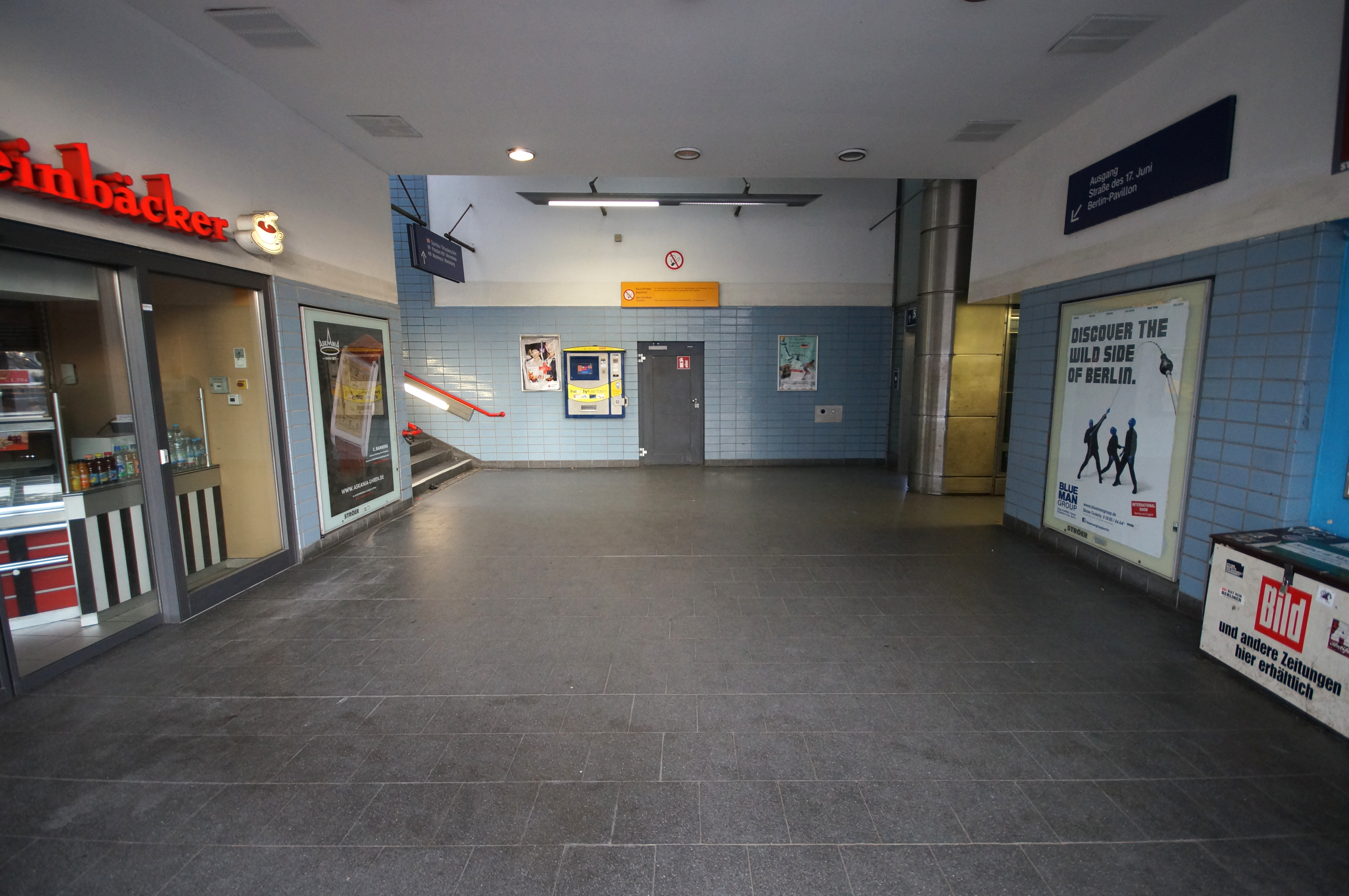 Die Bahnhofshalle des Bahnhofs Berlin-Tiergarten auf der Berliner Stadtbahn